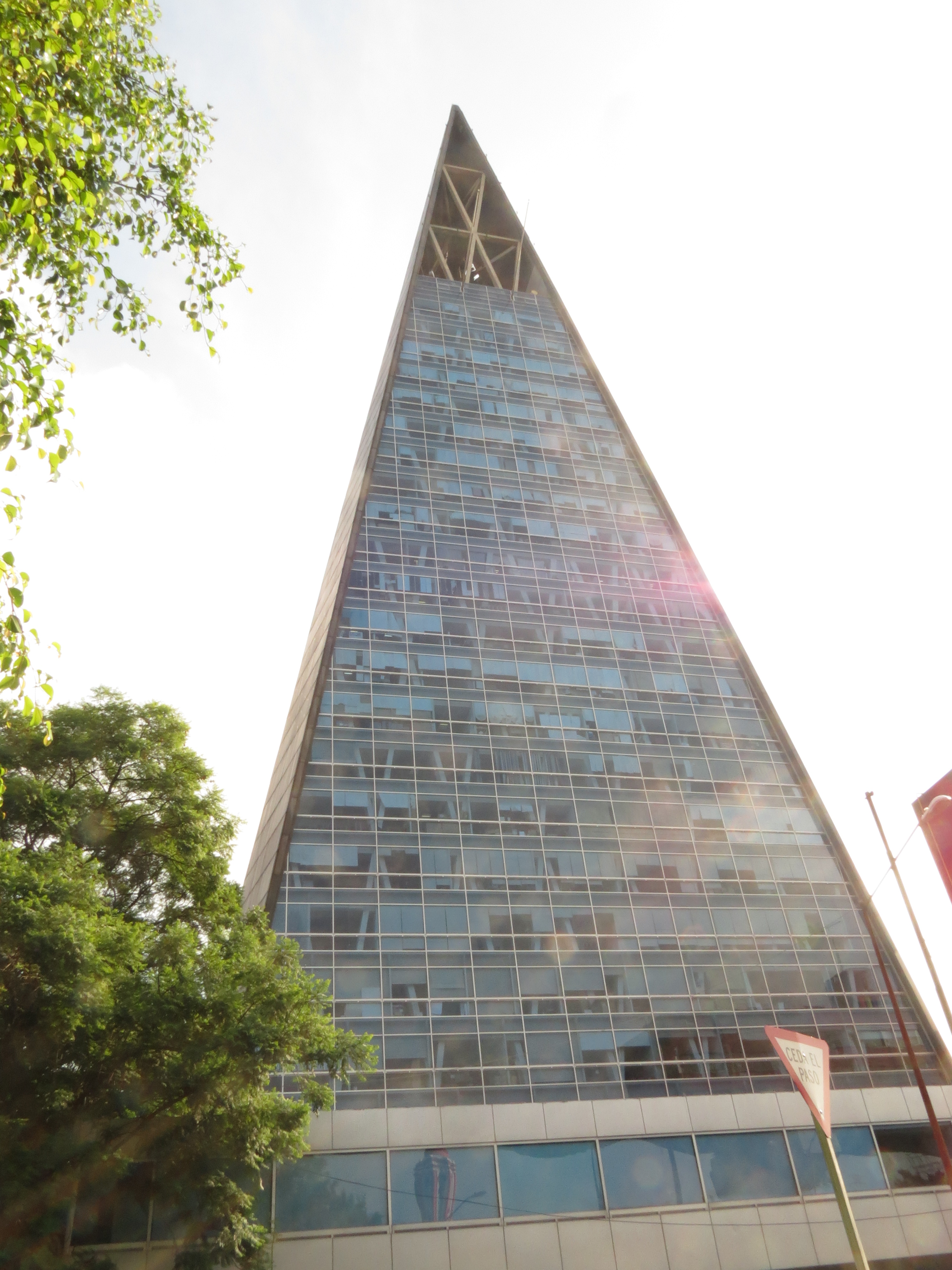 Vista de la cara sur de la Torre Insignia desde la av. Ricardo Flores Magón